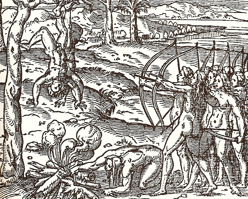 "Comme les Amazones traitent ceux qu'elles prennent en guerre"